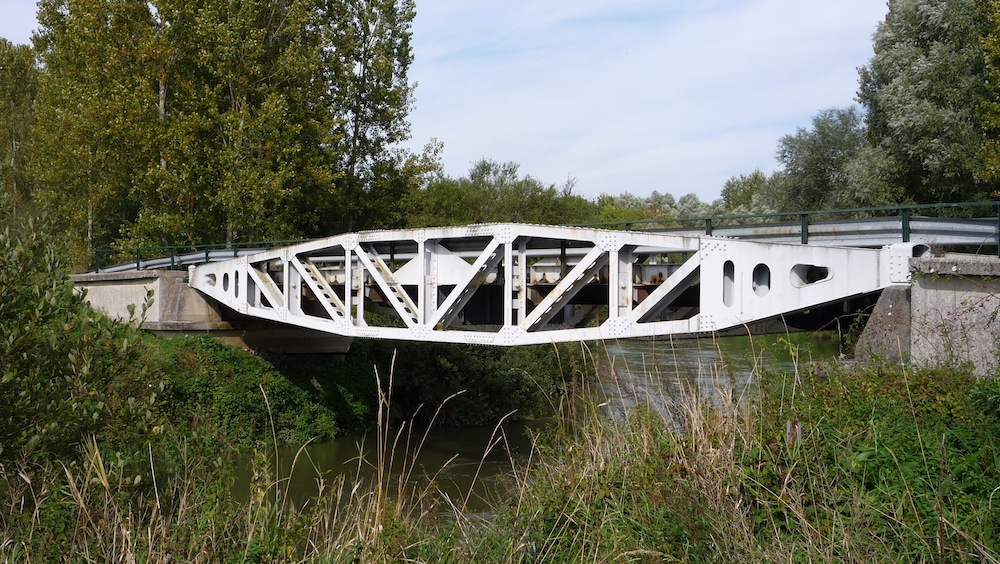 Le pont sur l'Oise à Manicamp. Son armature est une des pièces utilisées en Normandie par les alliés en juin 1944 pour construire les ports artificiels dans le but de débarquer du matériel. Cette pièce a été apportée en 1947. Remplacé au printemps 2017 par un pont moderne. L’élément “whale pier” est placé à 250 m au sud-est comme témoin contemporain.